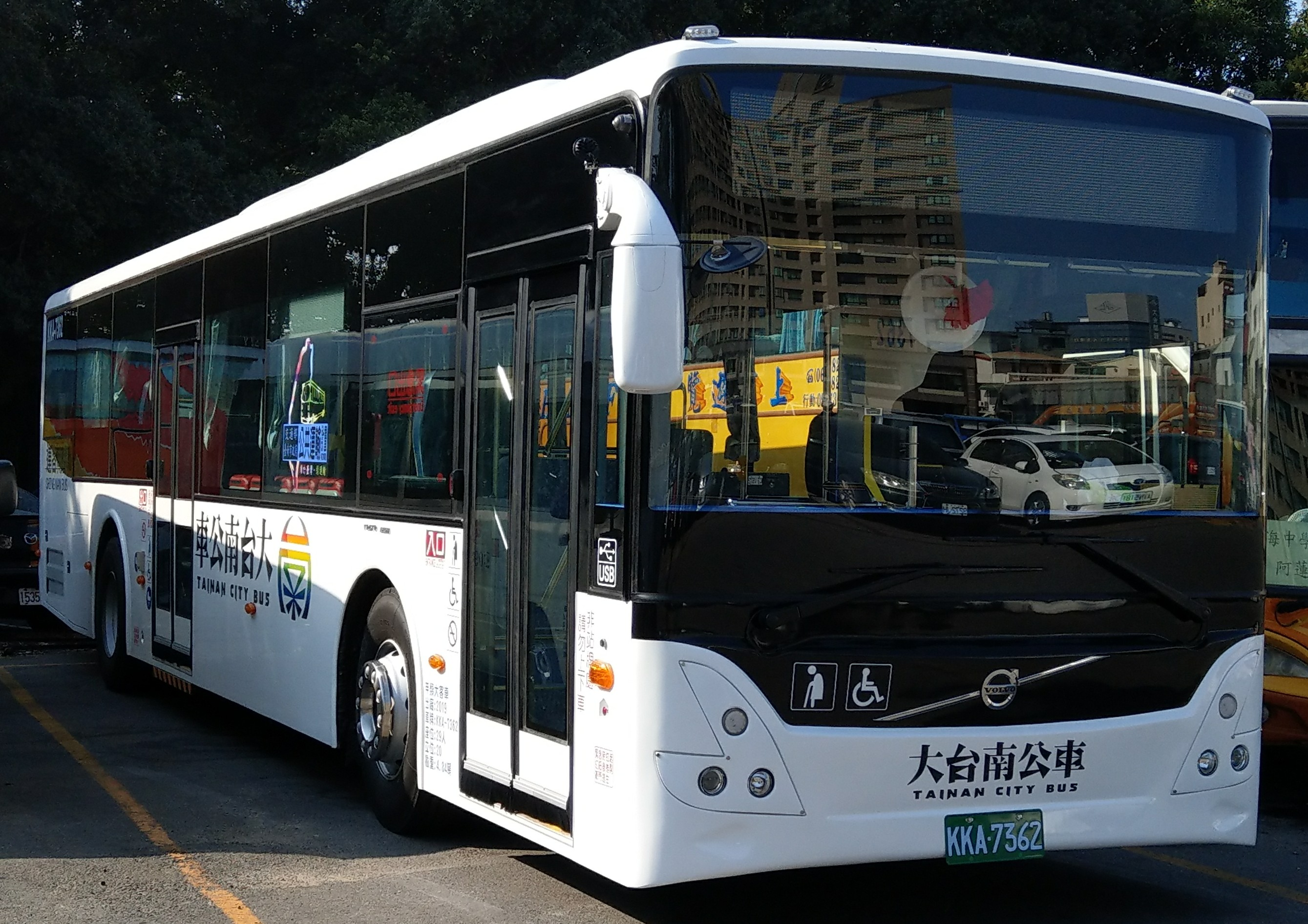 興南客運2019年11月出廠VOLVO B8RLE，KKA-7362